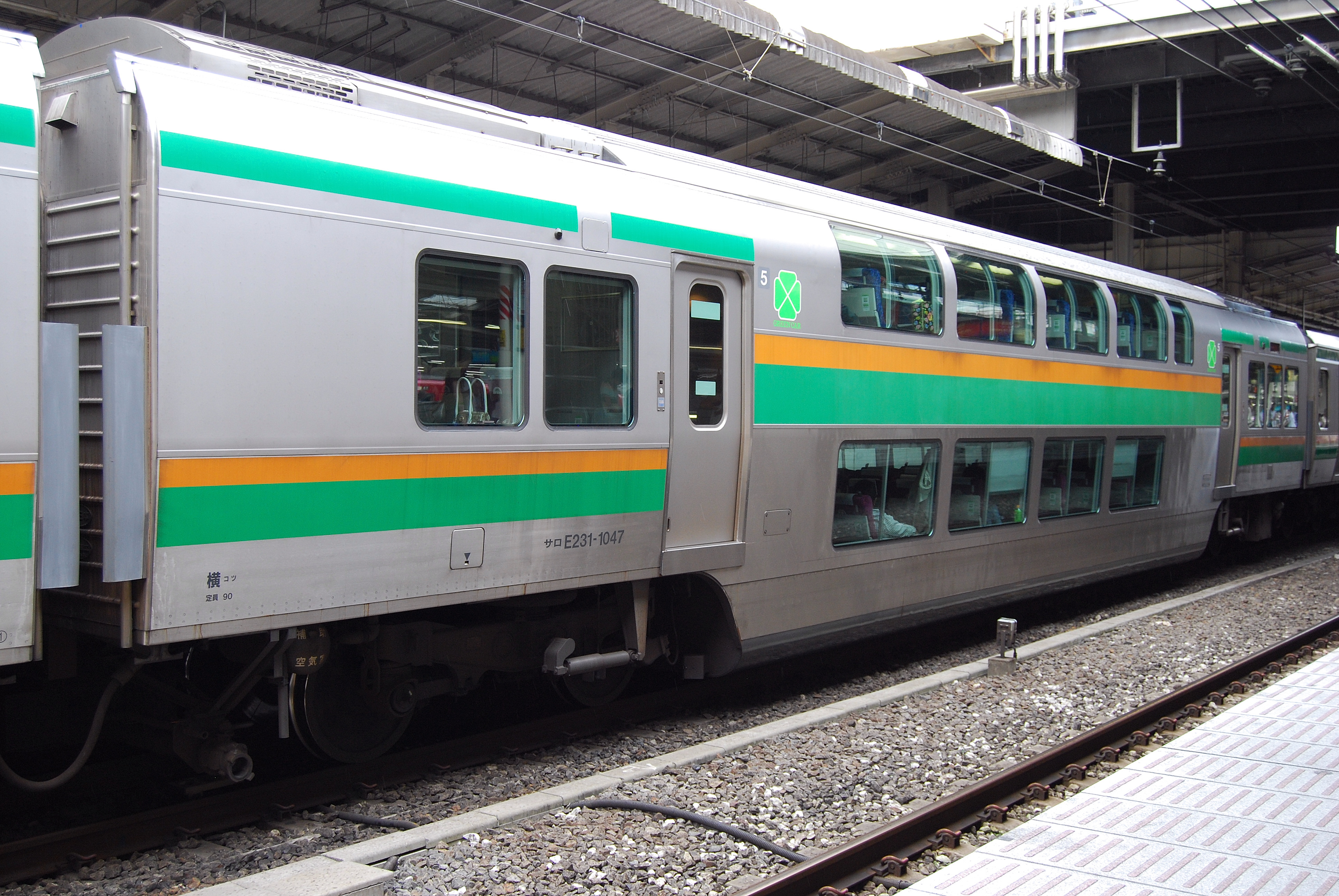 サロ231-1047（横浜駅）